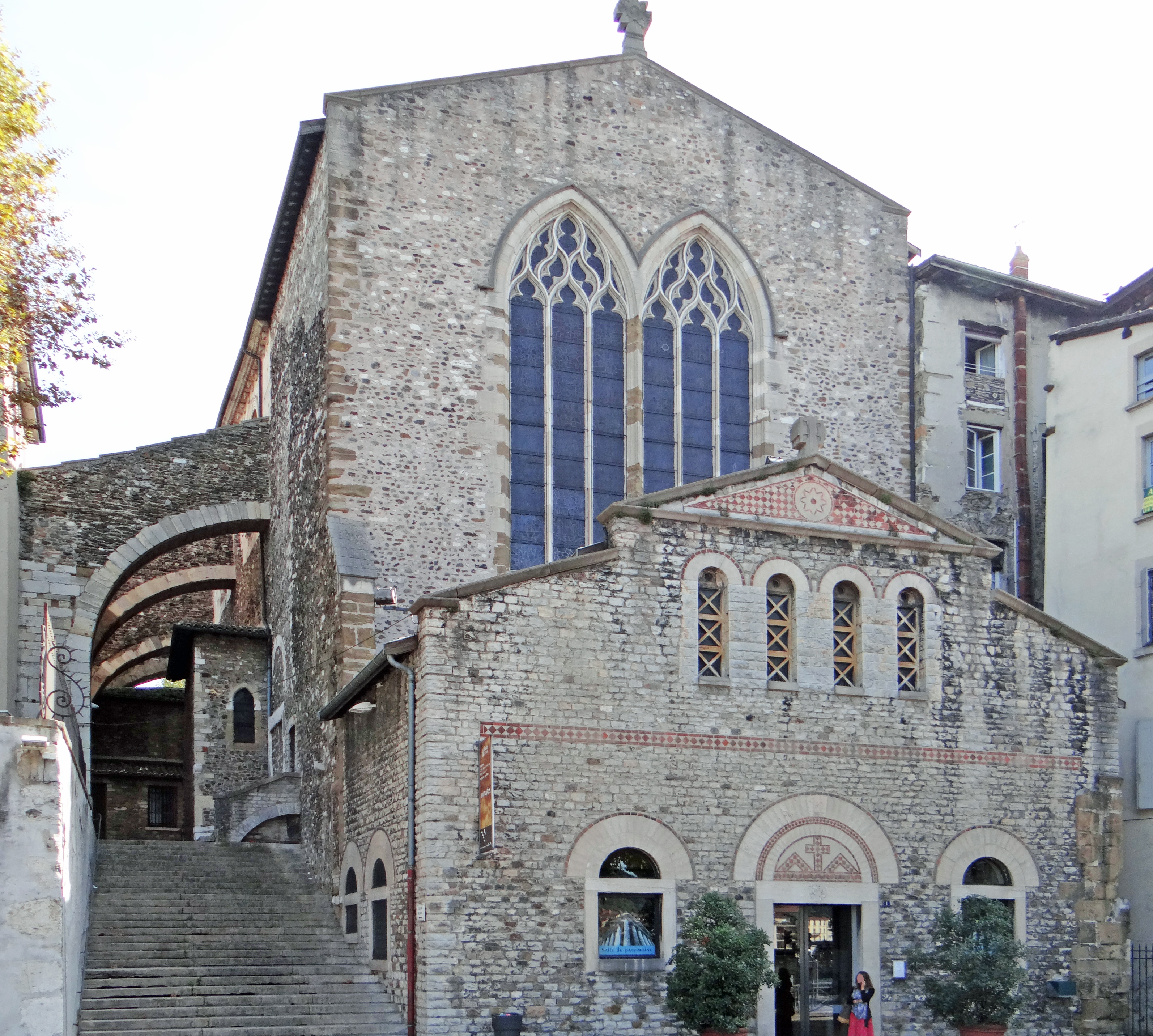 Vienne - Abbaye de Saint-André-le-Bas - Abbatiale : façade occidentale